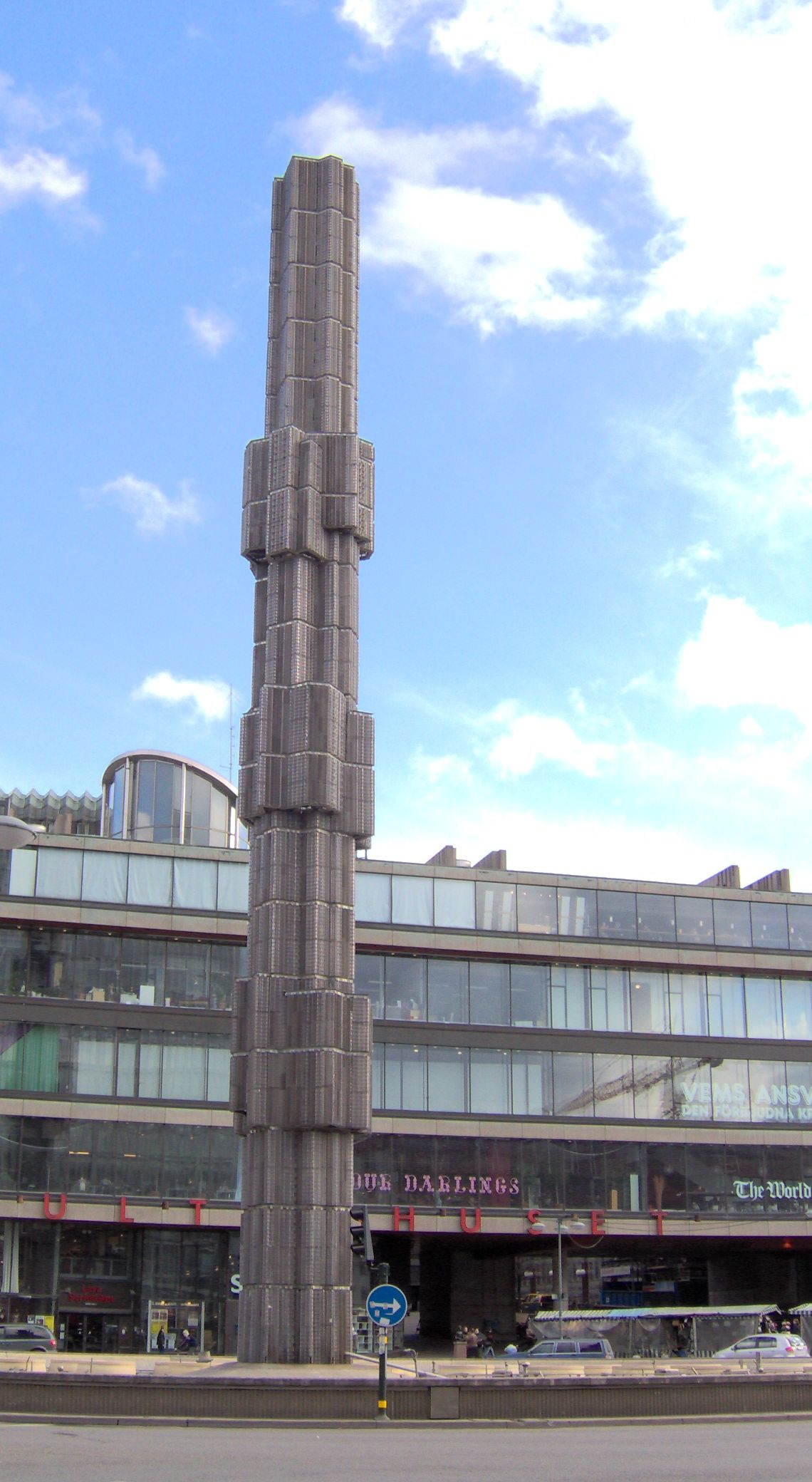 Sergelpinnen i Stockholm.